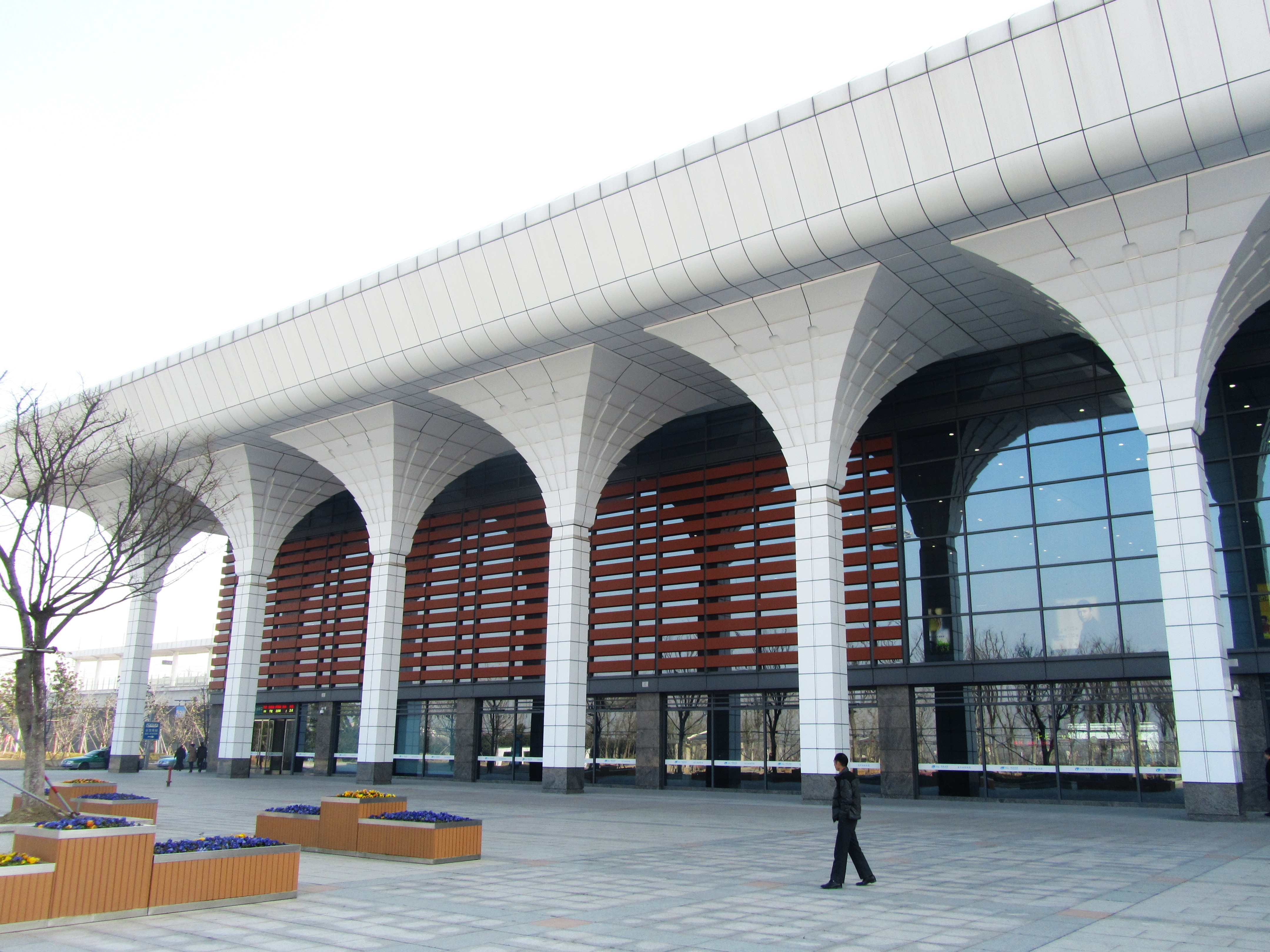 宁杭客运专线长兴站，自西侧看站房。